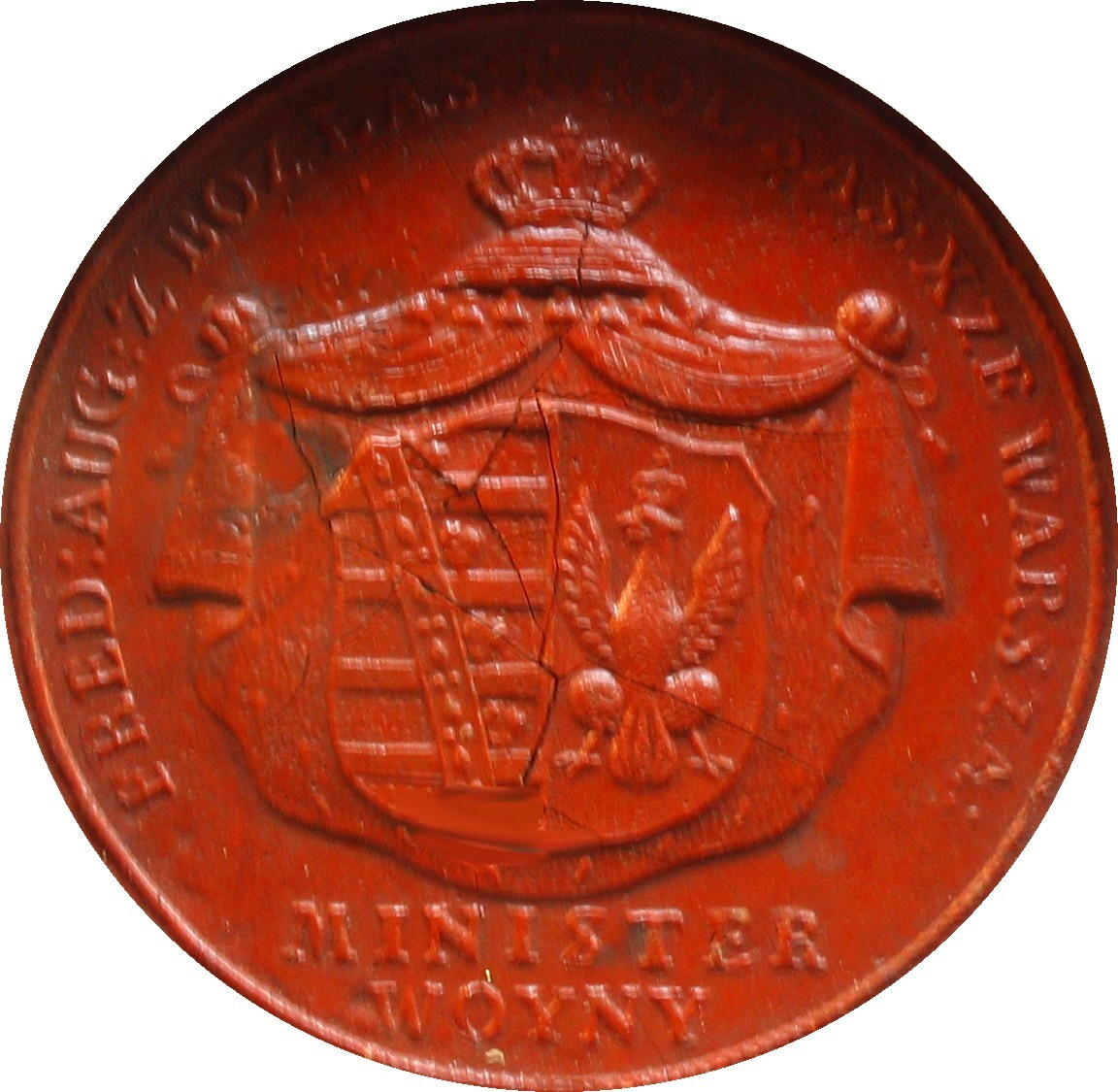 Pieczęć księcia Józefa Poniatowskiego, ministra wojny Księstwa Warszawskiego author User:Mathiasrex Maciej Szczepańczyk